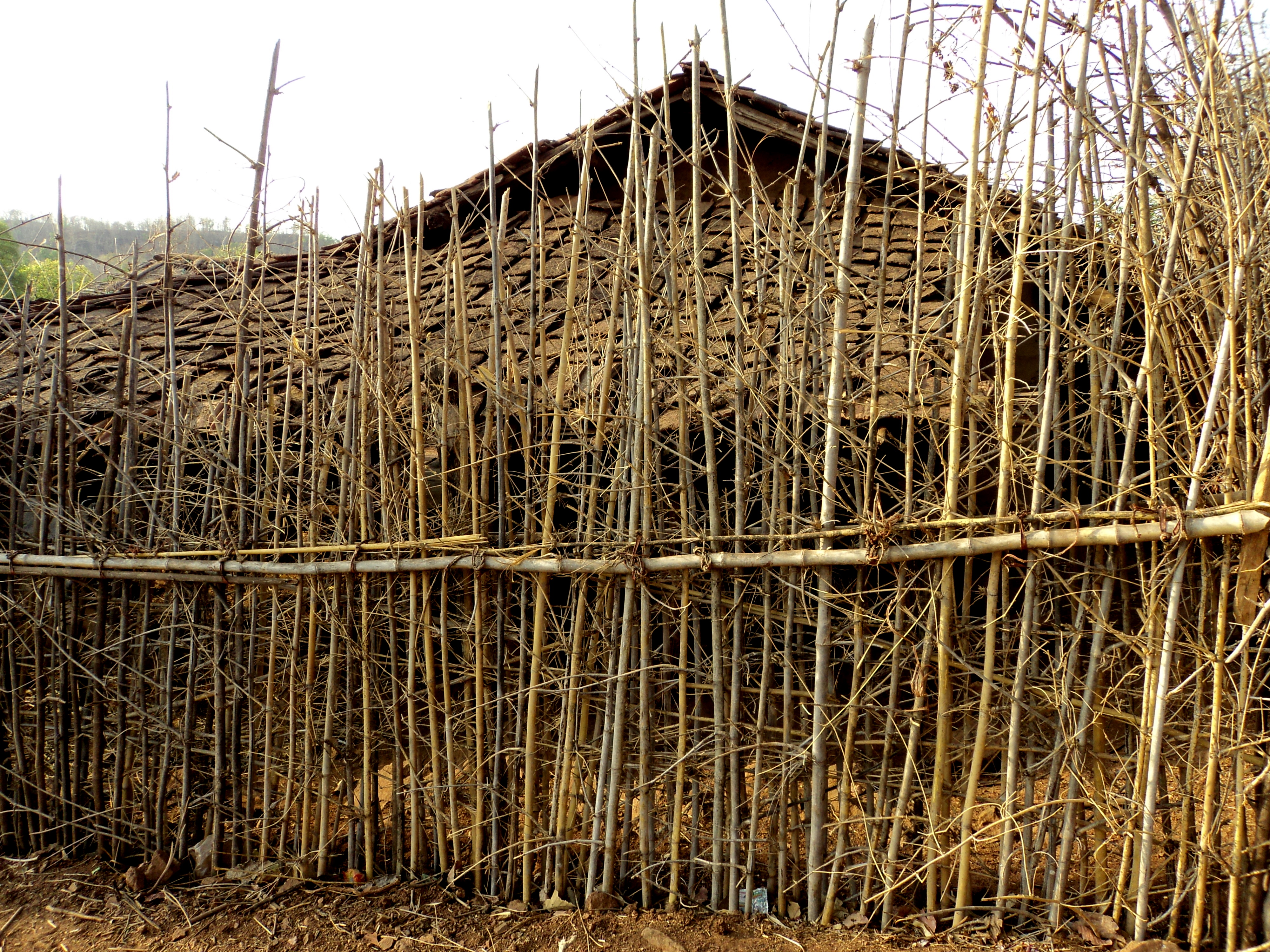 एक ठेठ आदिवासी घर : सौजन्य: घनश्याम शर्मा